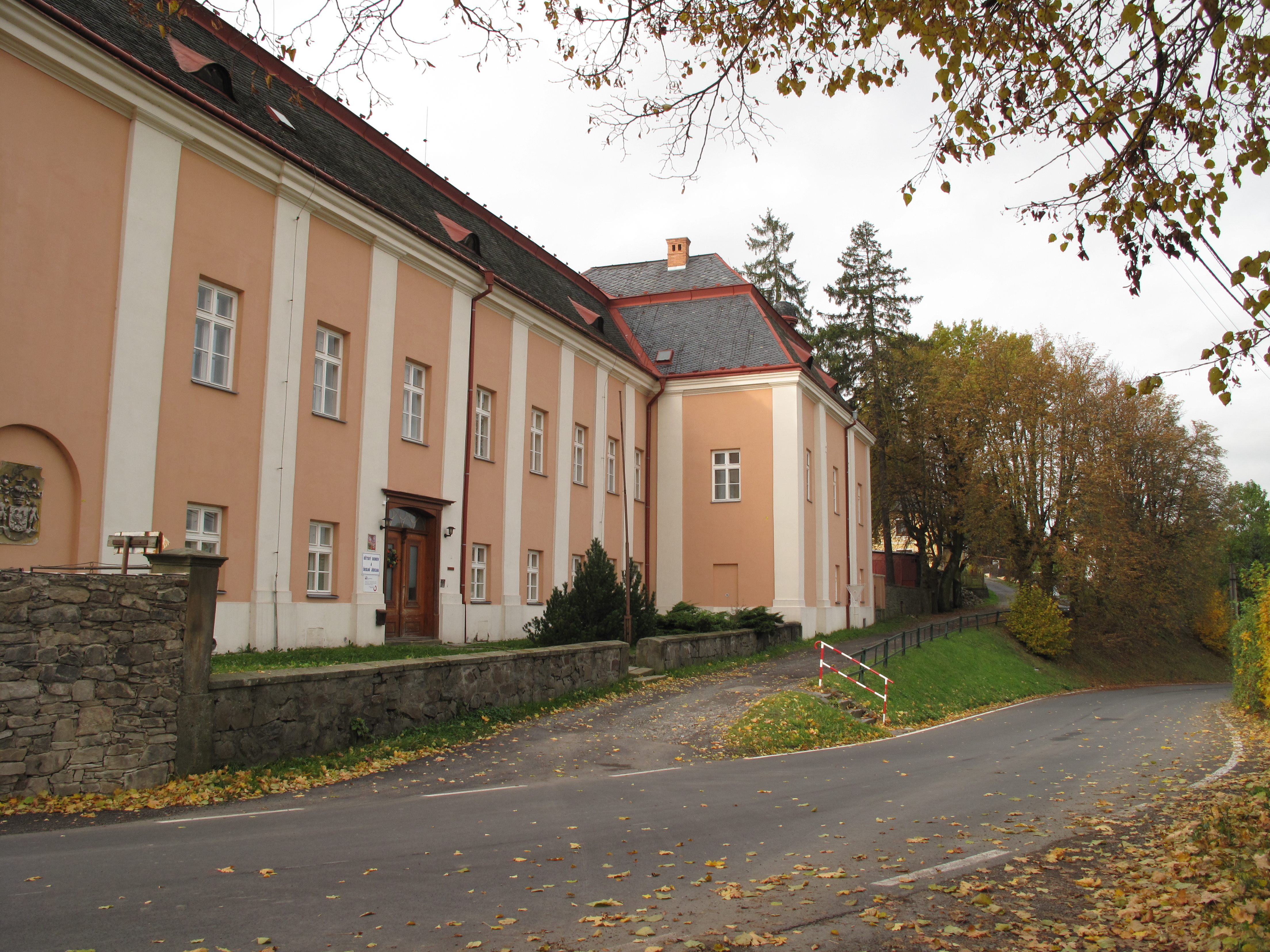 Melč. Okres Opava, Česká republika.